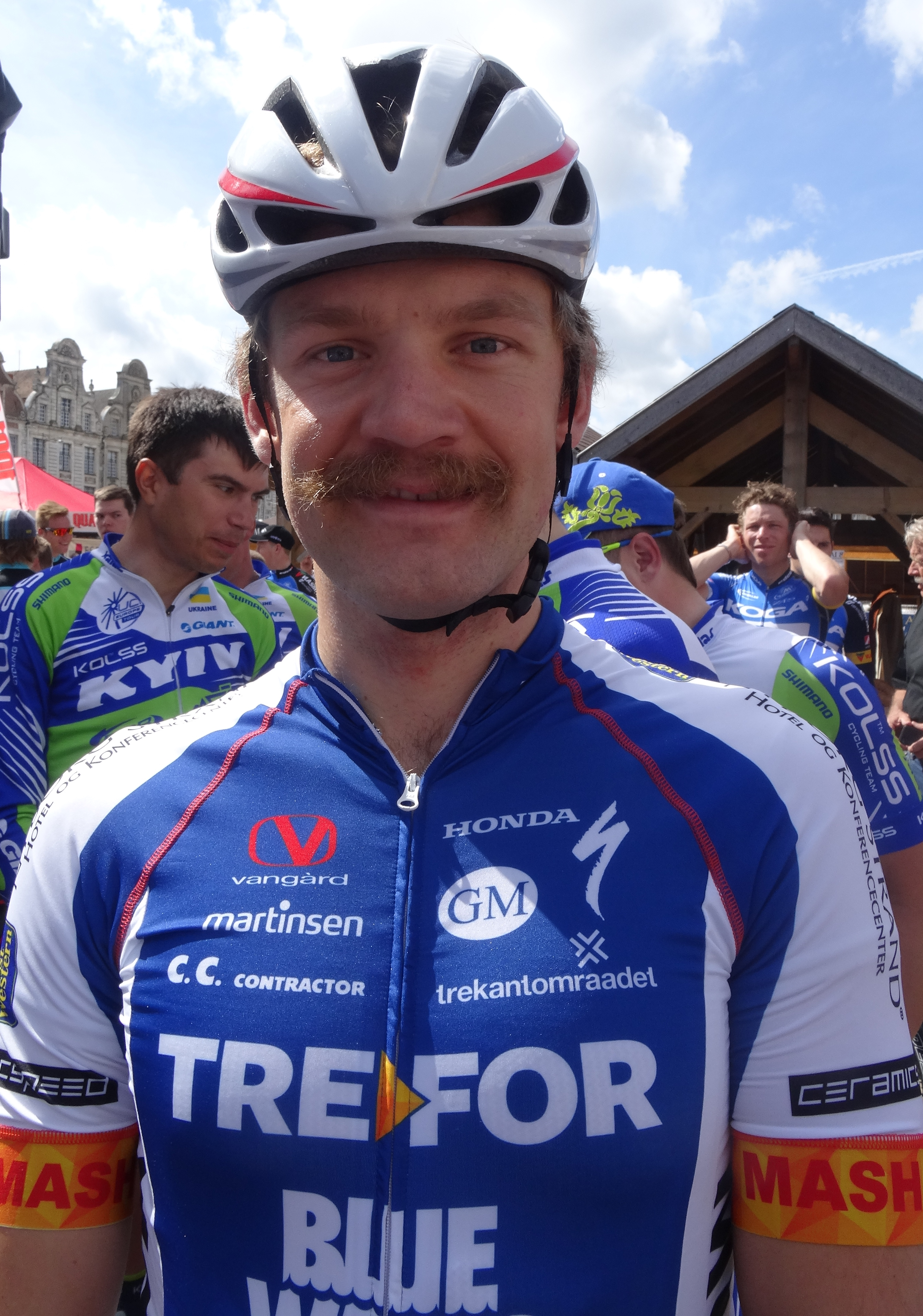 Reportage photographique réalisé le dimanche 25 mai 2014 à l'occasion du départ et de l'arrivée de la troisième étape du Paris-Arras Tour 2014 à Arras, Pas-de-Calais, Nord-Pas-de-Calais, France. Depicted person: Rasmus Christian Quaade Depicted team: Trefor-Blue Water